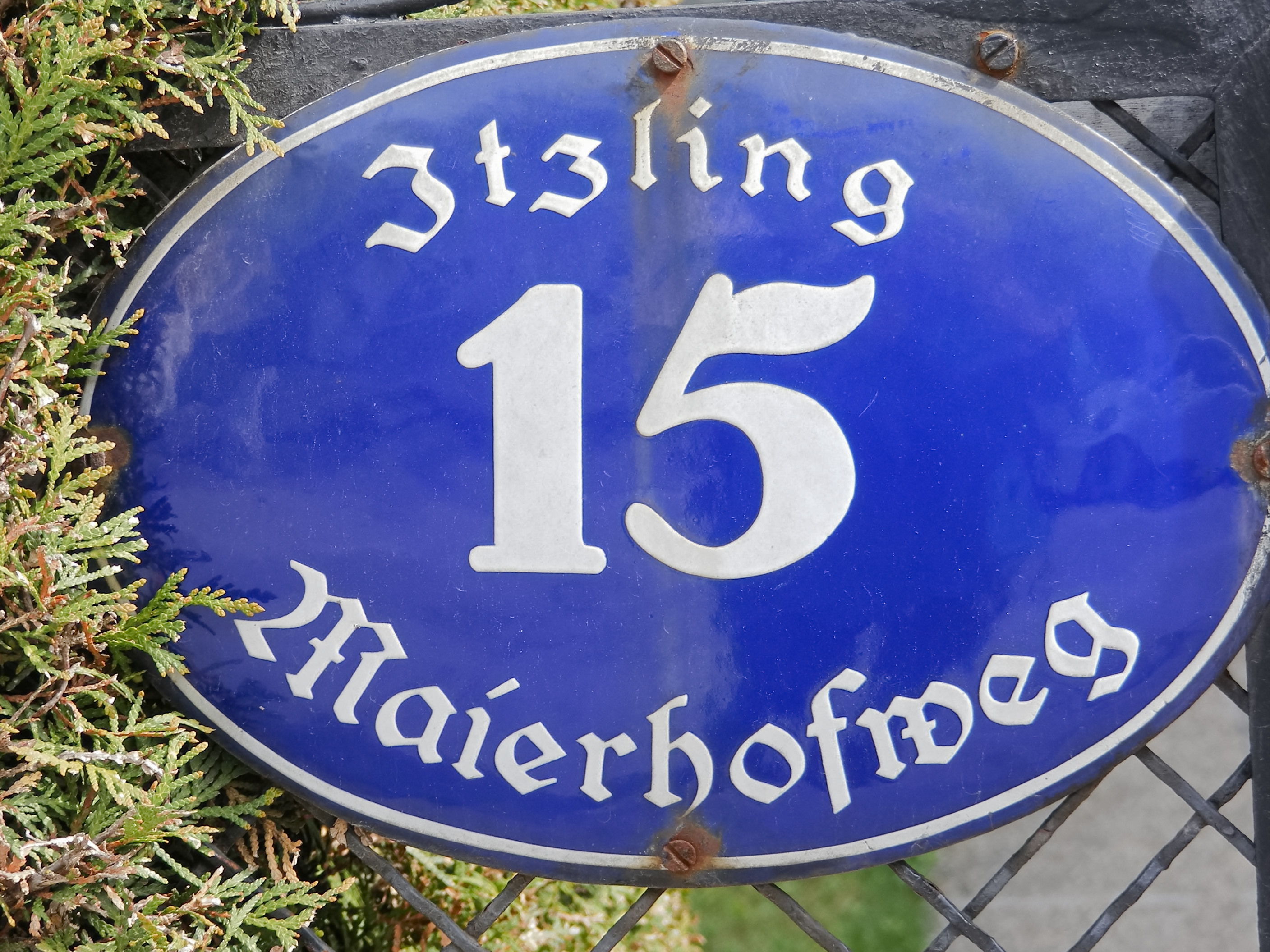 Altes Hausnummernschild des Gebäudes Meierhofweg [sic] 15 im Salzburger Stadtteil Schallmoos. Die Bezeichnung Itzling auf der Tafel bezieht sich auf die Lage innerhalb der Katastralgemeinde Itzling, deren Grenzen nicht identisch sind mit denen des gleichnamigen Stadtteils.